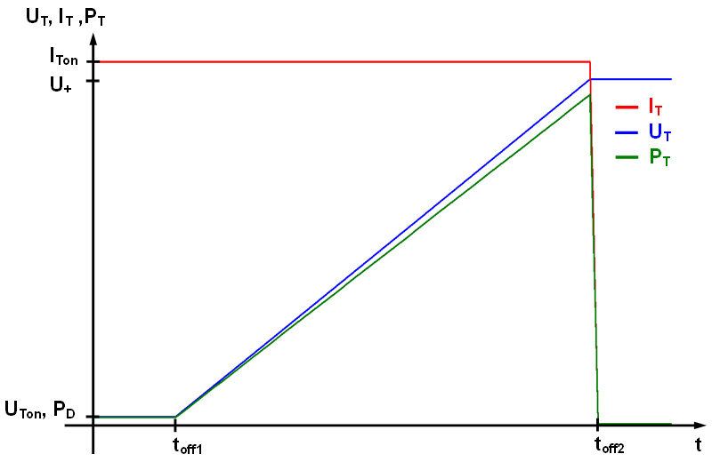 Diagramm: Schaltverluste bei induktive Last